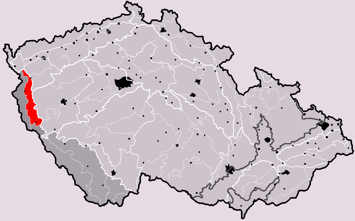 Poloha geomorfologického celku Podčeskoleská pahorkatina v rámci České republiky. Hercynský systém Hercynská pohoří I Česká vysočina I1 (I) Šumavská subprovincie I1A (IA) Českoleská oblast I1A-2 (IA-2) Podčeskoleská pahorkatina